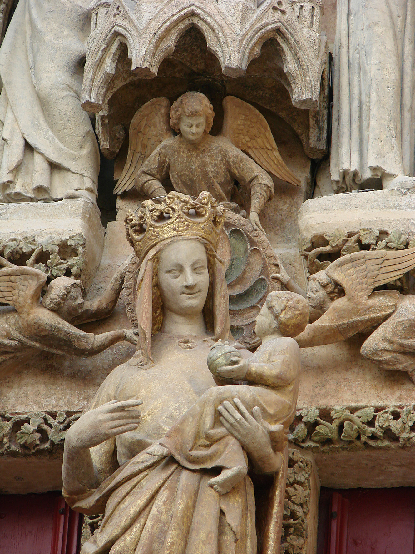 Statue de la Vierge,portail de la cathédrale d'Amiens.